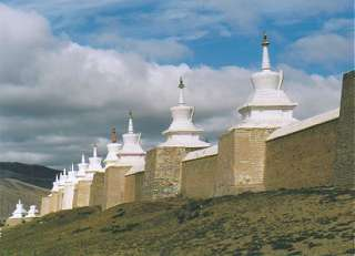 Erdene Zuu klooster, Mongolië